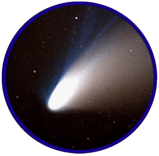 Stub comete Categoria:Immagini stub